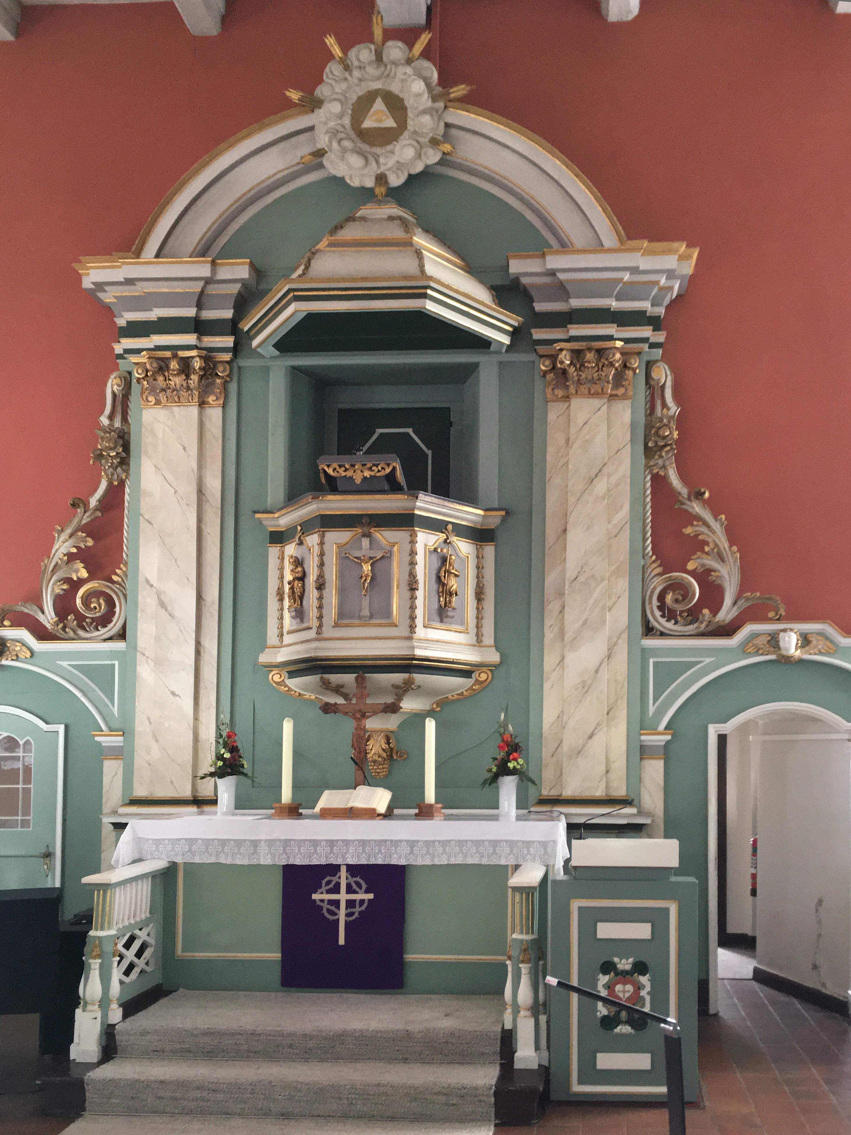 Die Kanzel ist flankiert von korinthischen Pilastern. Am Kanzelkorb ist in der Mitte die Kreuzigung dargestellt, seitlich davon sind Figuren von Moses und Johannes dem Täufer zu sehen. Nach oben wird das Werk durch ein Dreieck mit dem Auge Gottes abgeschlossen, das von einem Glorienschein aus Wolken und Sonnenstrahlen umgeben ist. Das Lesepult rechts neben dem Altar ist mit einer Darstellung der Lutherrose versehen.